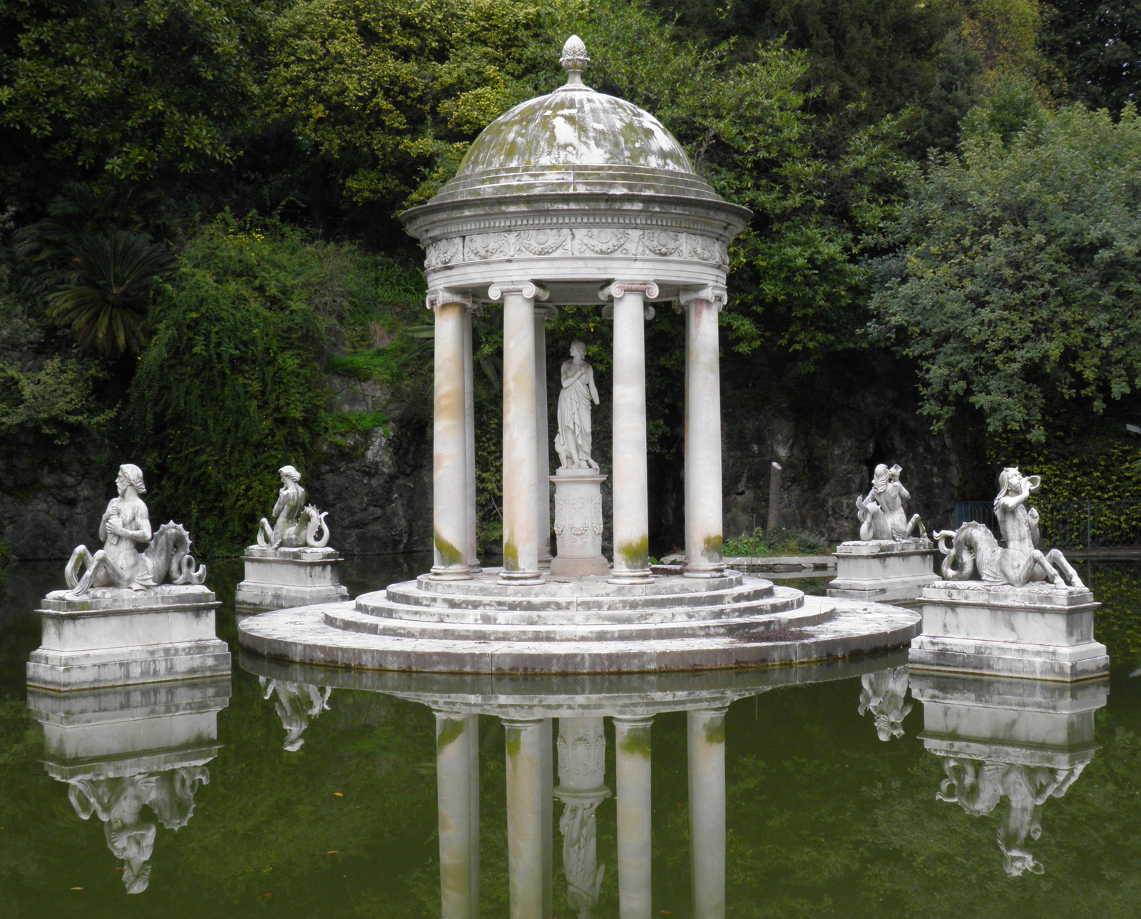 Parco e Villa Pallavicini This is a photo of a monument which is part of cultural heritage of Italy.